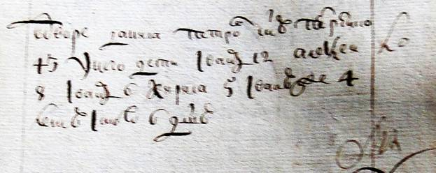 прапрадід Михайла Петренка